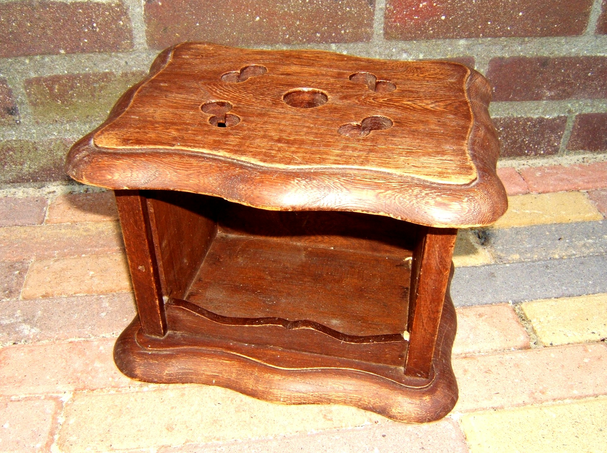 Categorie:Afbeelding voorwerp